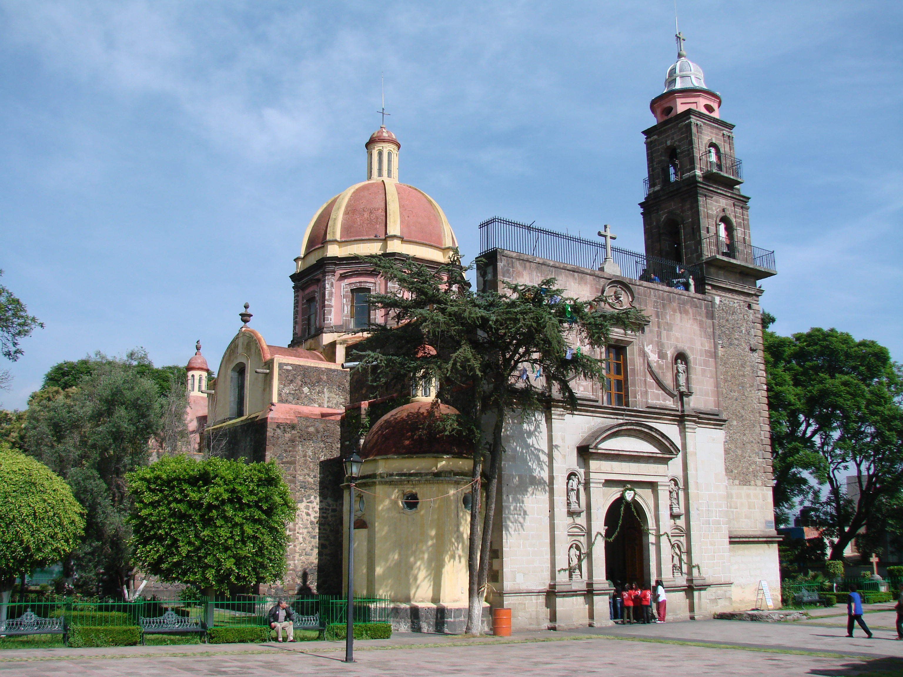 Imagén de la Iglesia de San Mateo Xalpa